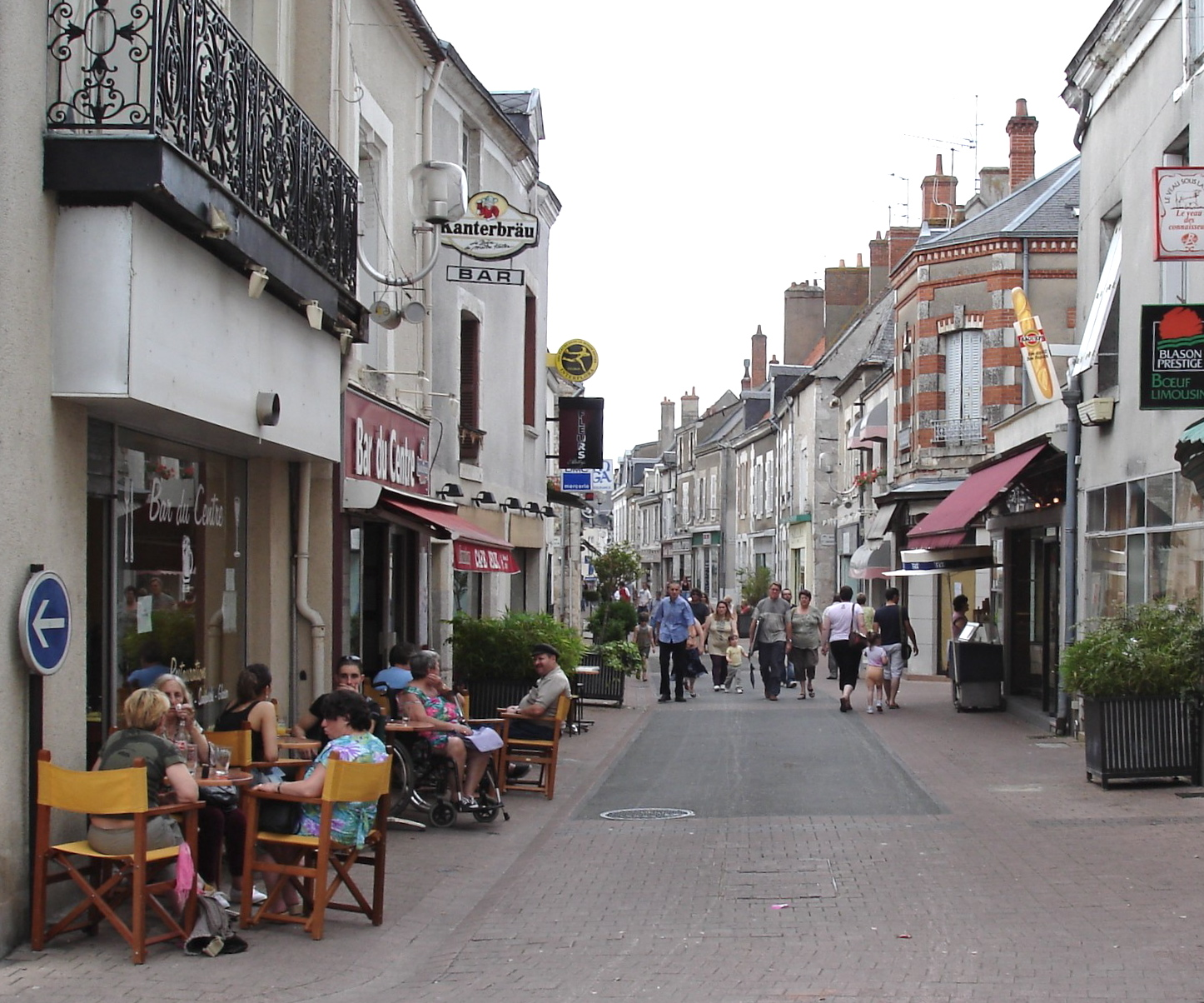 Centre-ville de Mer